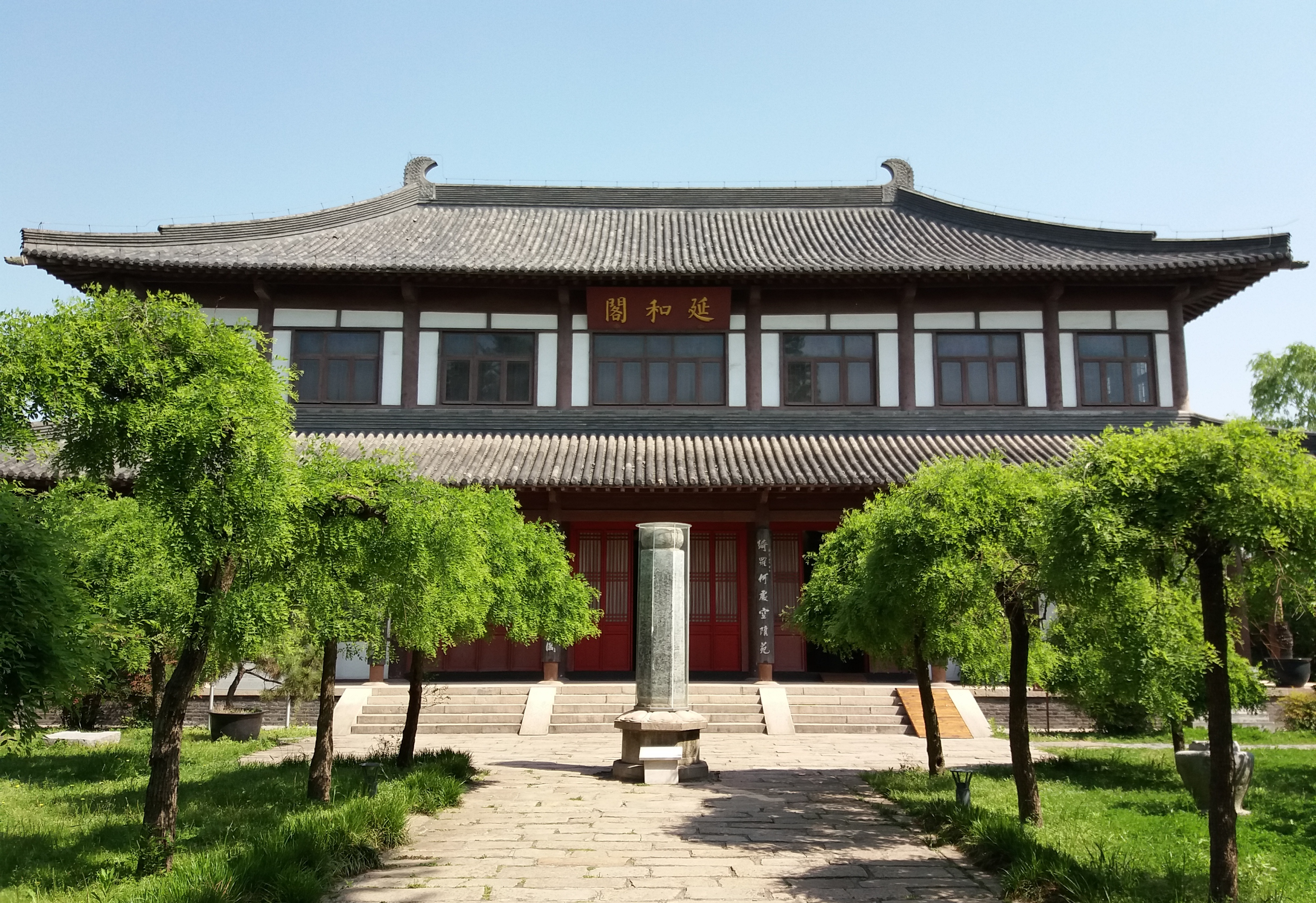 扬州唐城遗址园中的延和阁